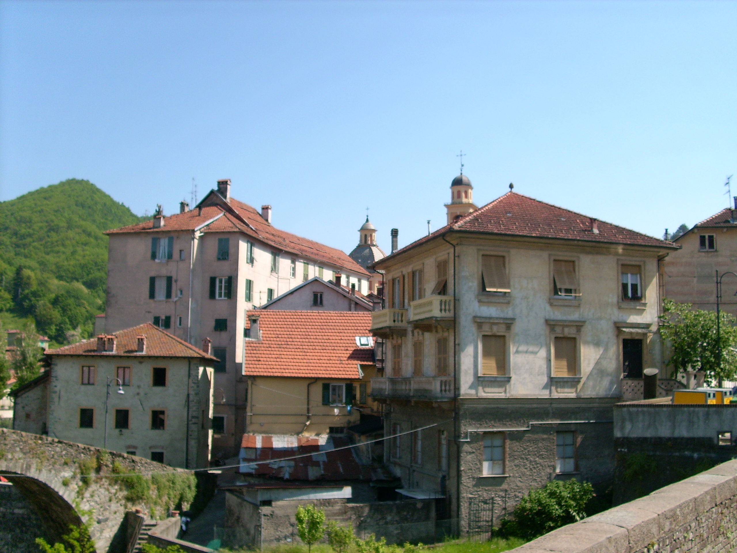 Rossiglione Inferiore, Liguria, Italia